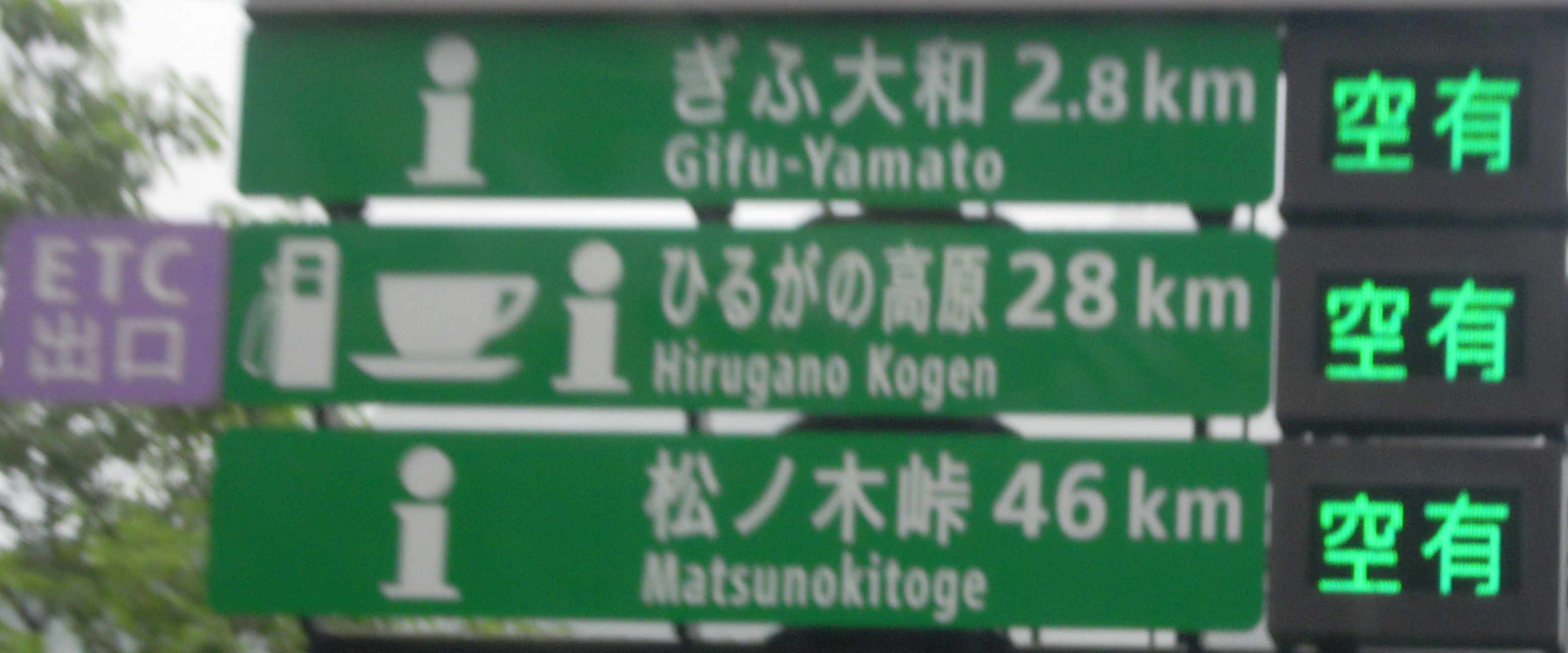 東海北陸自動車道のぎふ大和PA、ひるがの高原SA、松ノ木峠PAの駐車場の満空状況を表す標識。